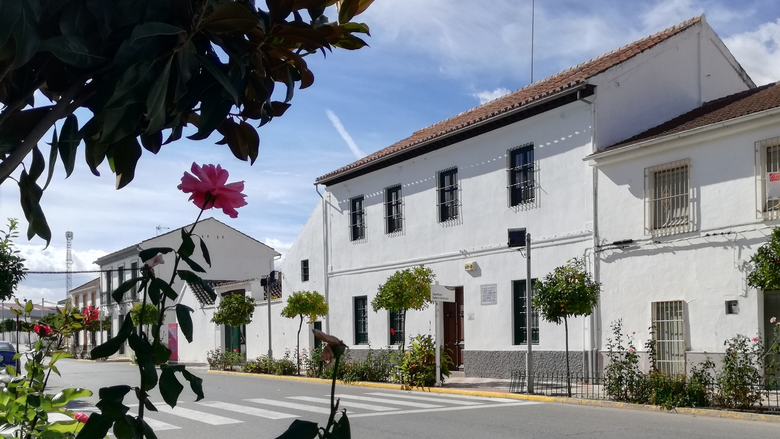 En esta casa vivió la familia García Lorca desde 1905 hasta 1909. Desde ese año y hasta 1926 sería el lugar de encuentro cada verano.